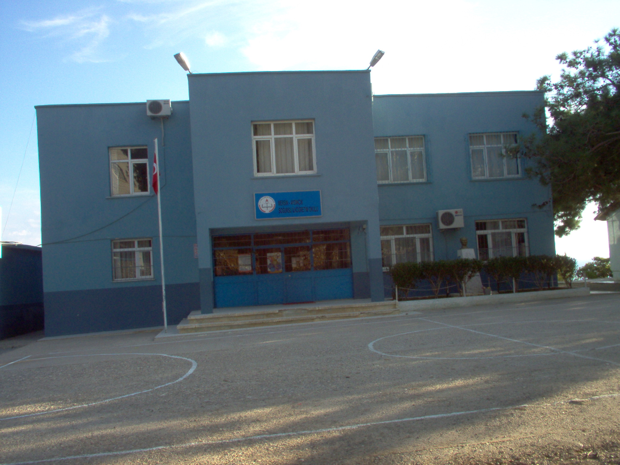 Yenikaş, Aydıncık